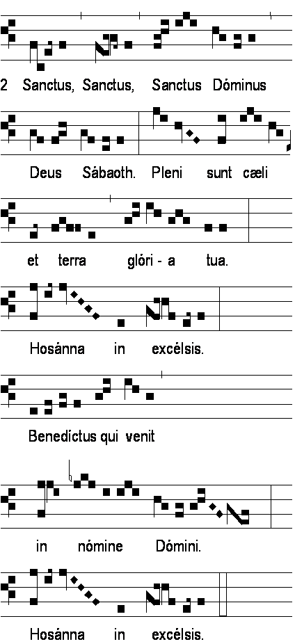 Sanctus n°11 (Dimanches des temps ordinaires)